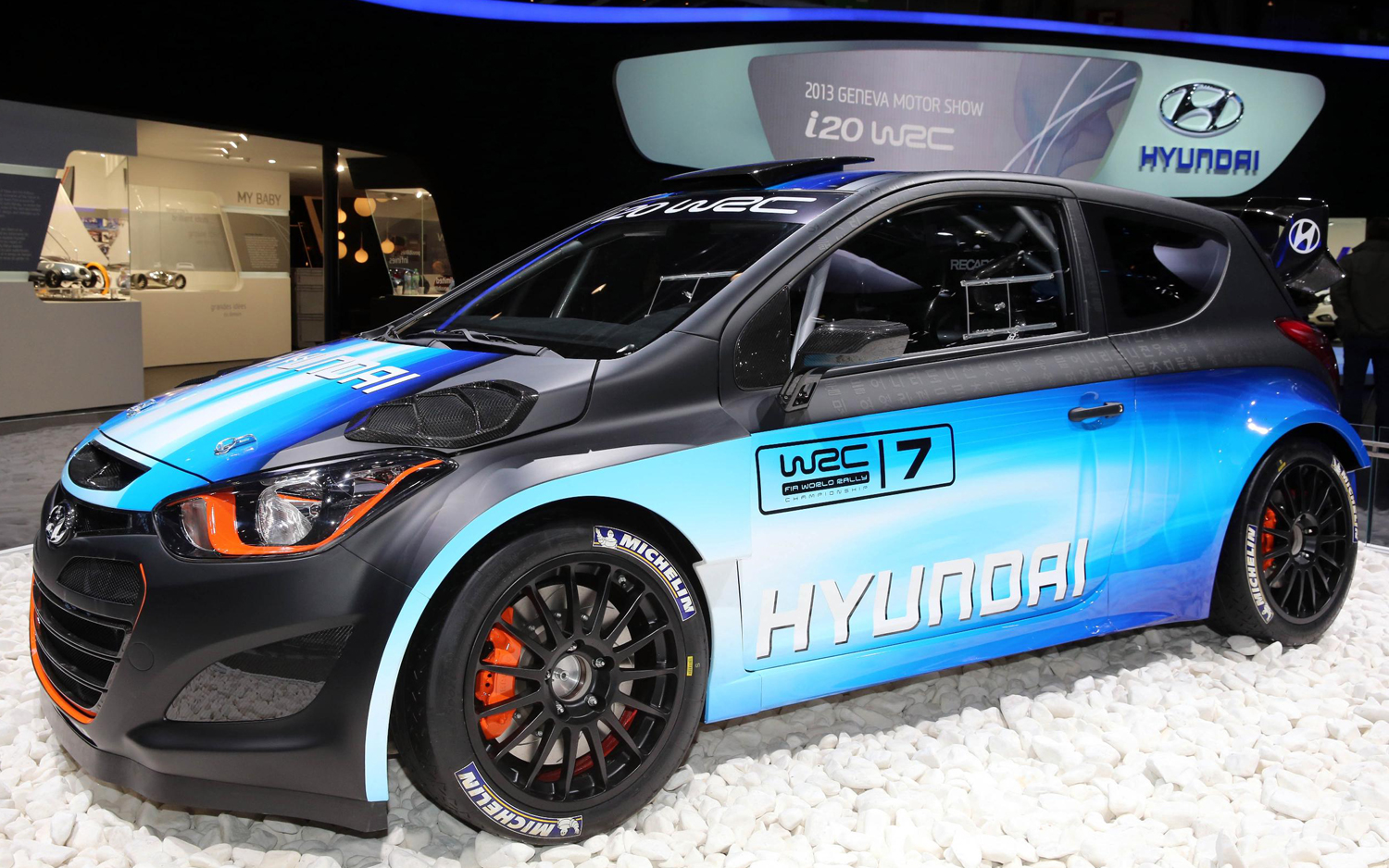 Hyundai i20 WRC - Ginevra 2013